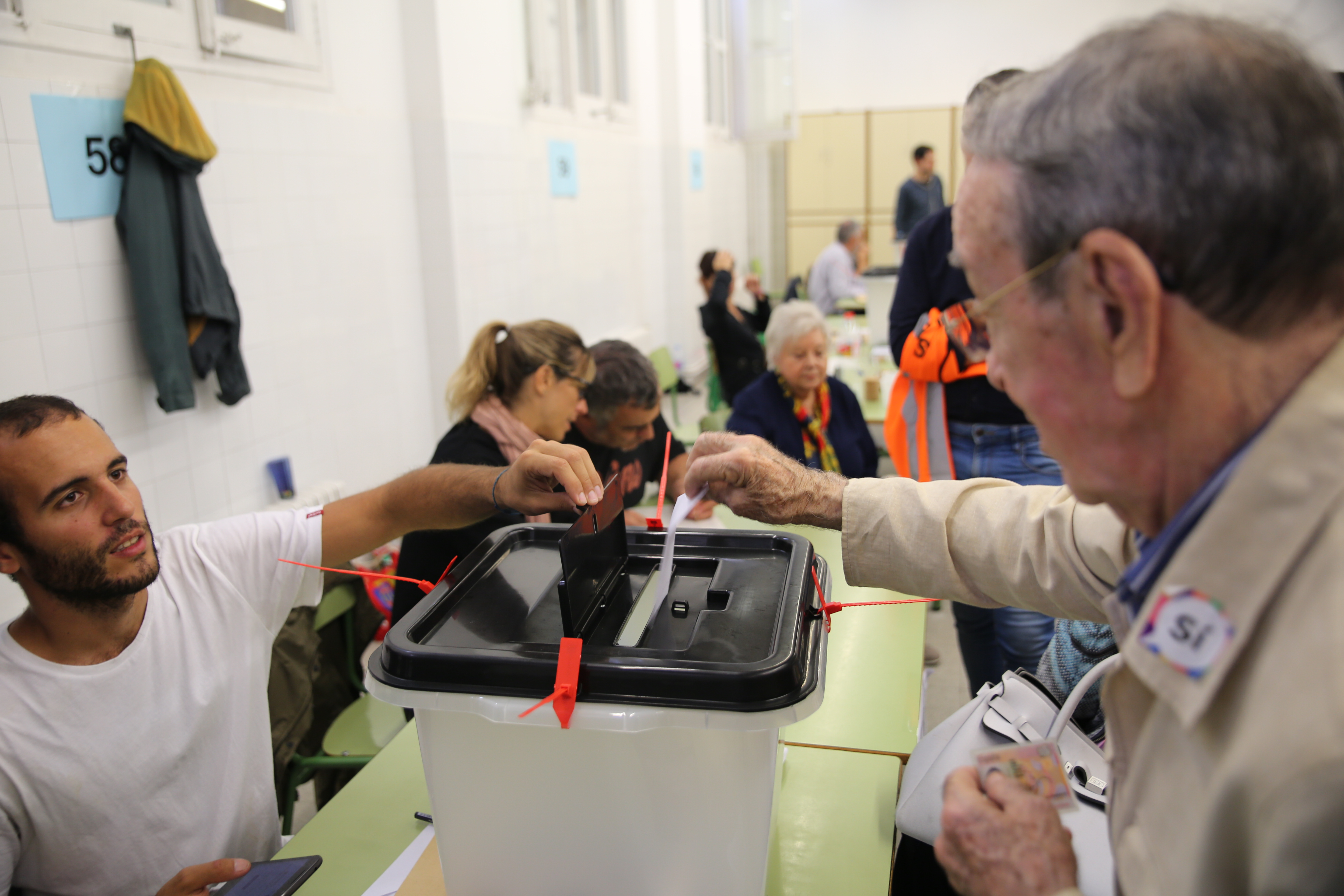 Referendum de independencia de Cataluña del 1 de octubre de 2017 Wikipedia: Catalan independence referendum, 2017 See alsocategory: Catalan independence referendum, 2017.